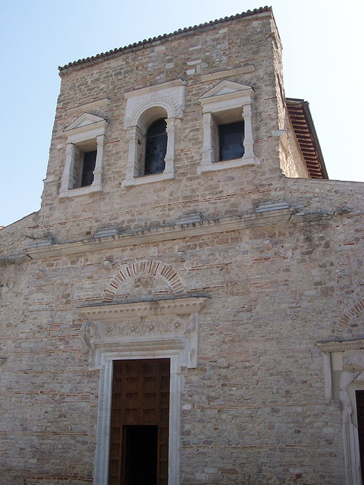 Spoleto - Basilica di S. Salvatore